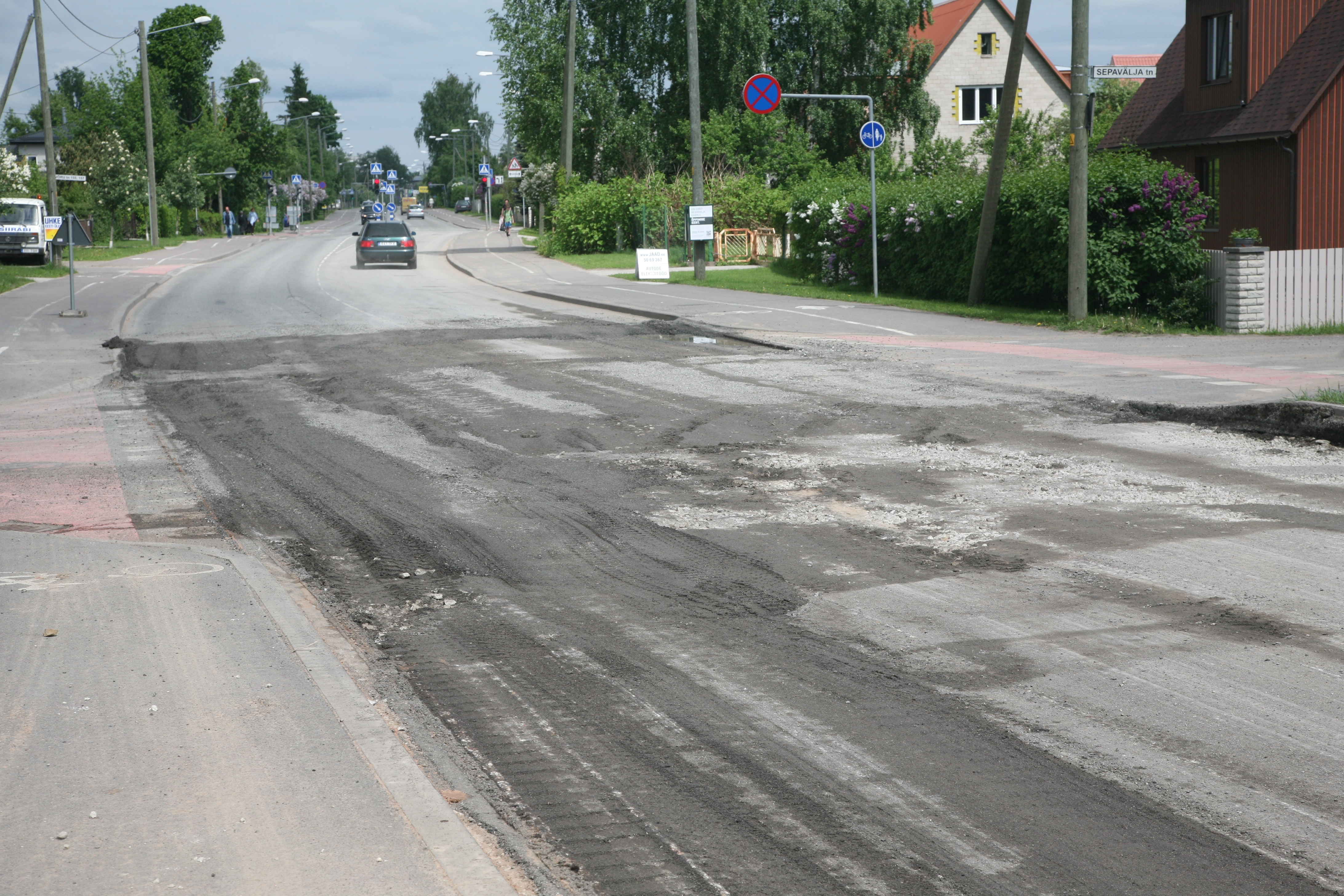 Võru tänava lõpp Tartus Idaringtee ehitustööde ajal, esiplaanil osaliselt freesitud asfalt, 28. mai 2013